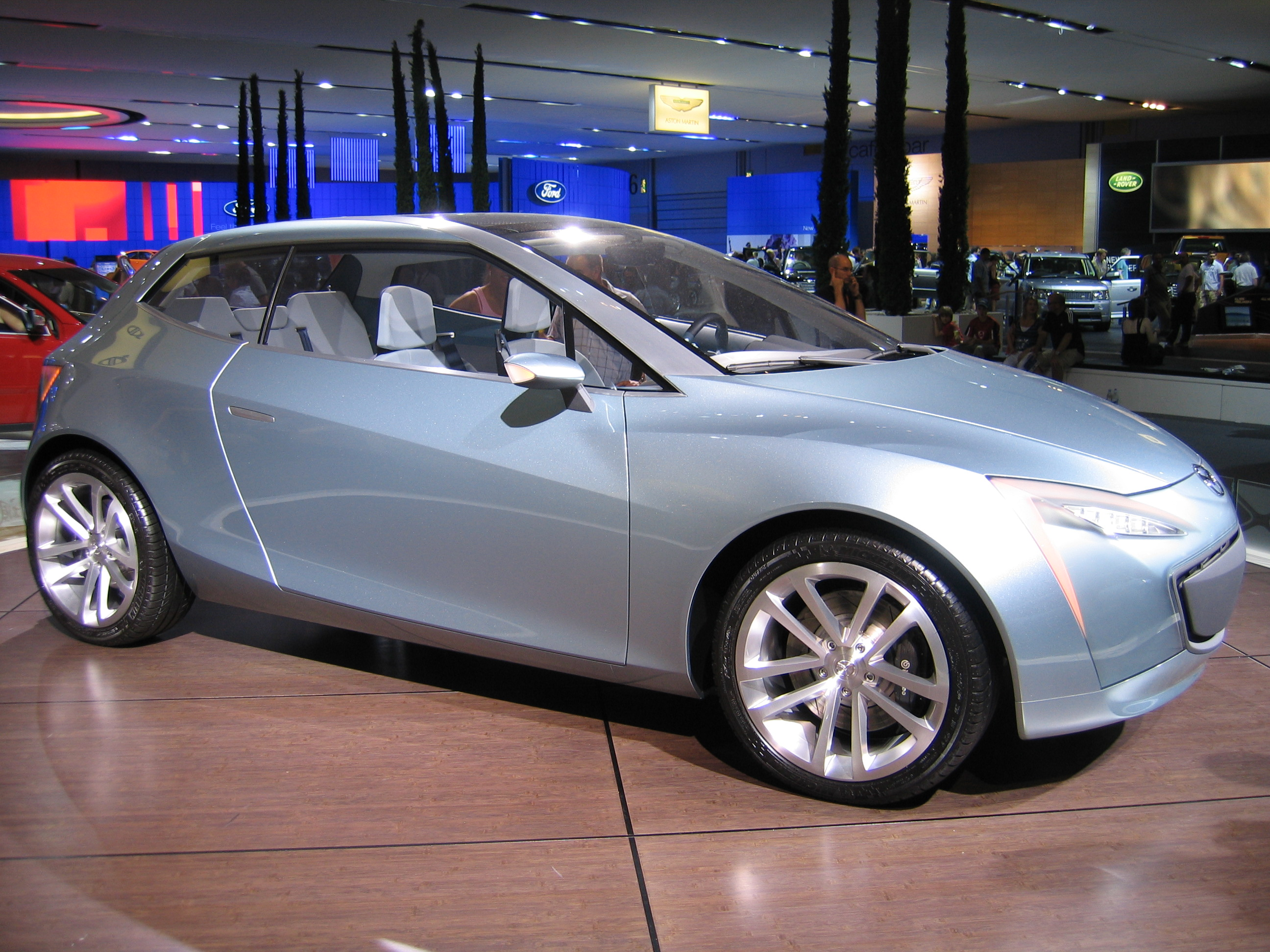 Mazda Sassou Concept Car